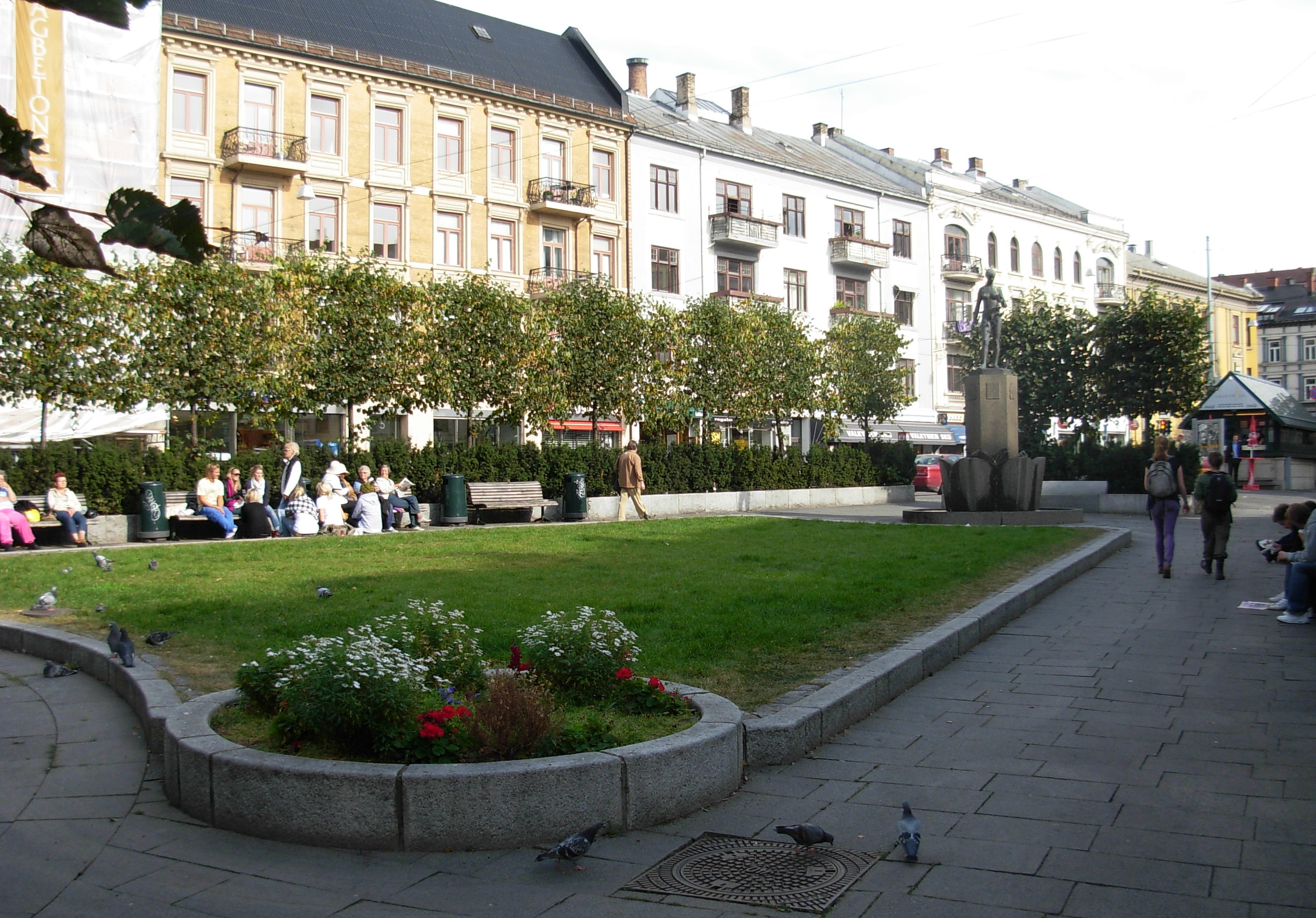 Valkyrie plass, parken